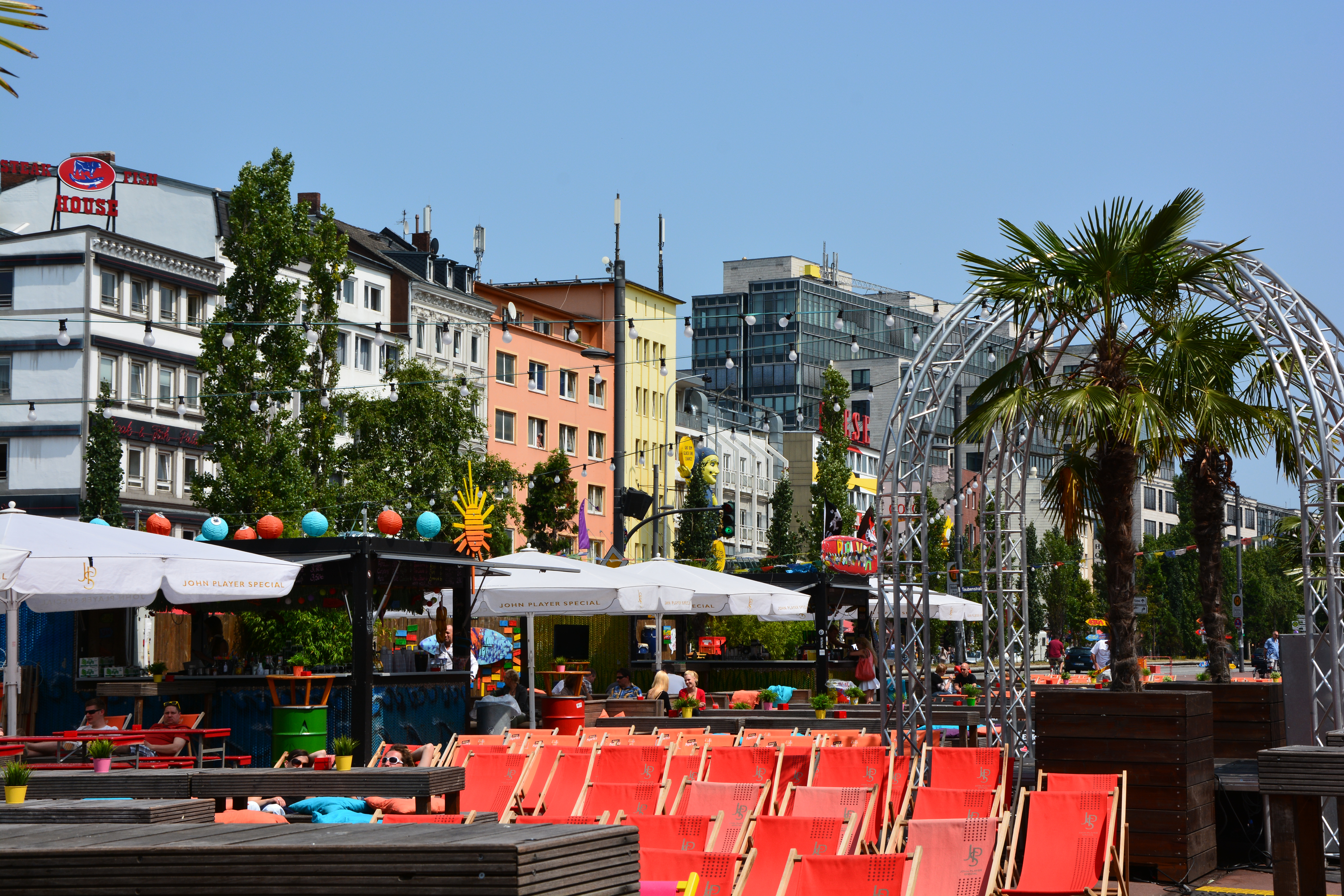 Die Veranstaltungsfläche "Spielbudenplatz" in Hamburg-St.Pauli